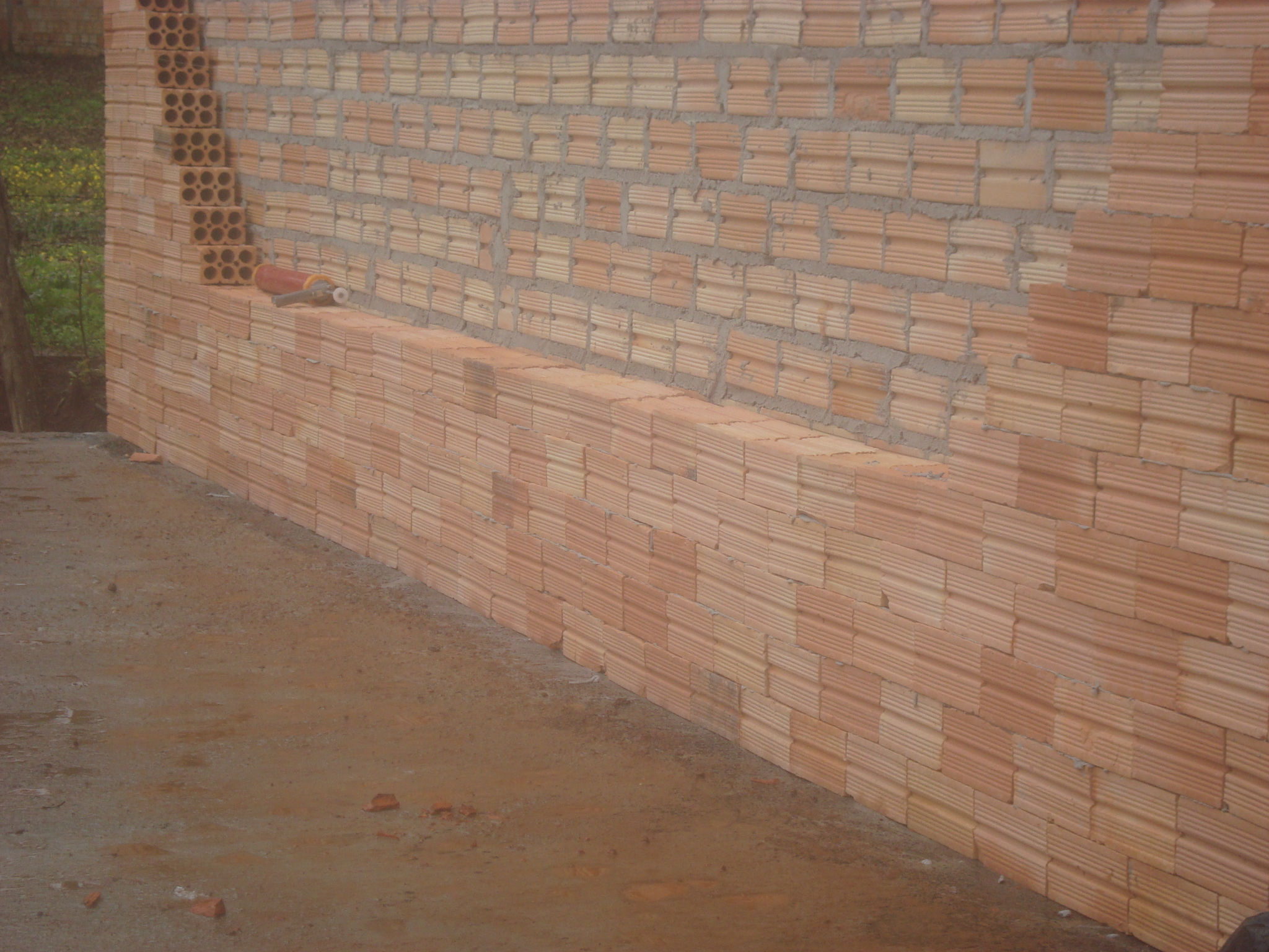 Parede construída com argamassa poliméria ARGAPRONTA em frente à parede construída com argamassa convencional